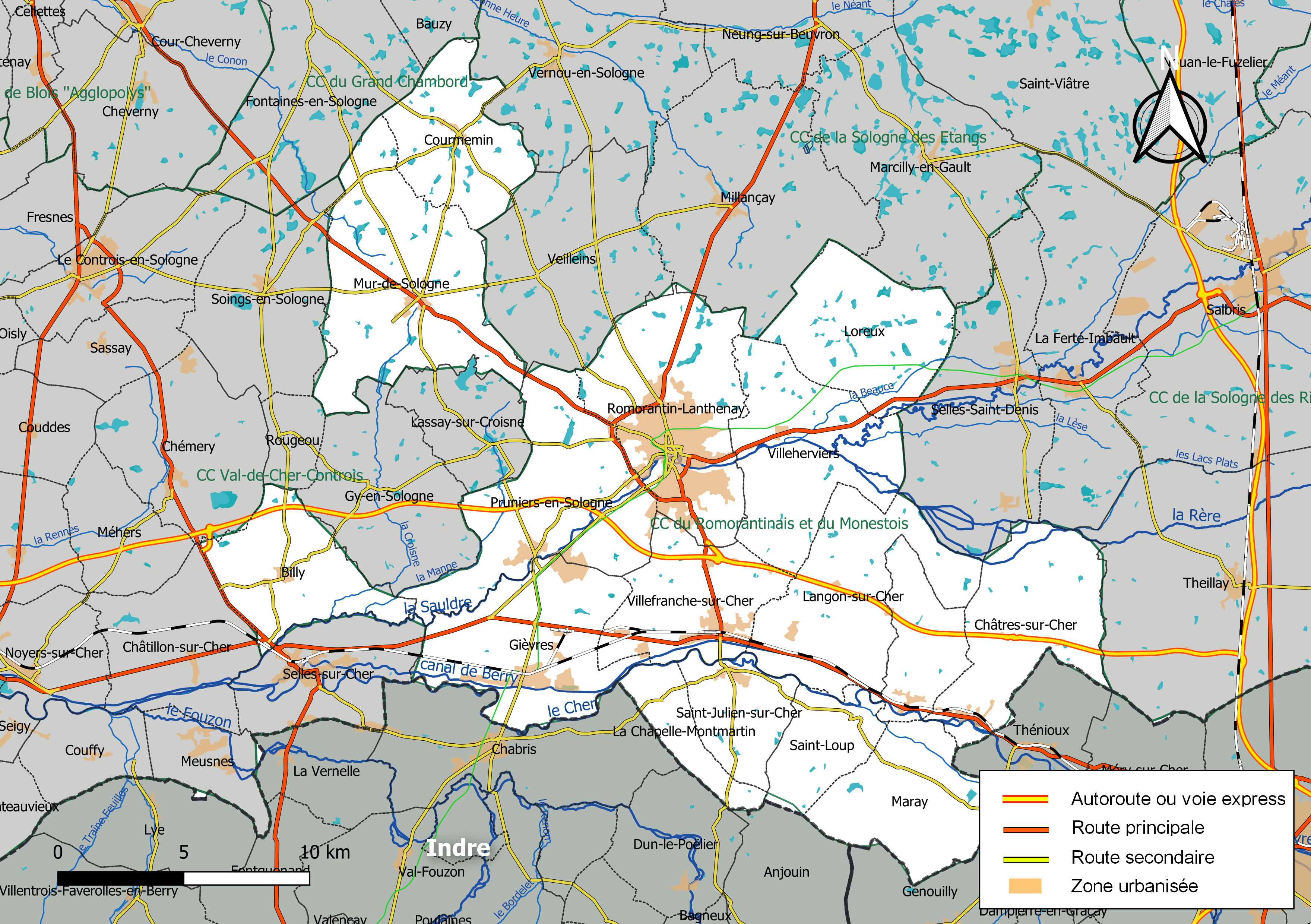 Carte de la communauté de communes du Romorantinais et du Monestois, département de Loir-et-Cher, France. Composition au 1er janvier 2019.